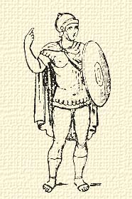 Katonai abolla az ókorban